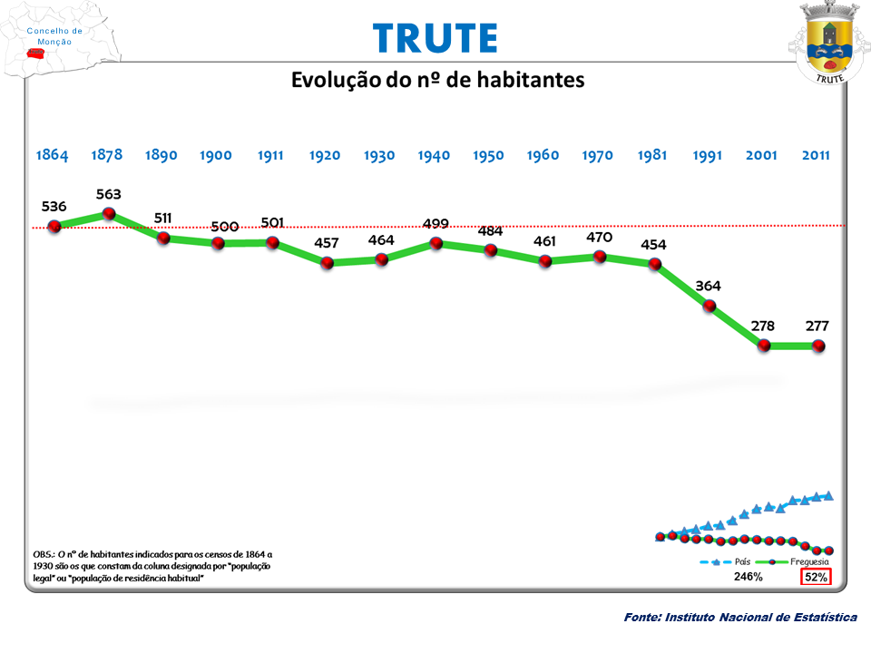 Censos 1864/2011